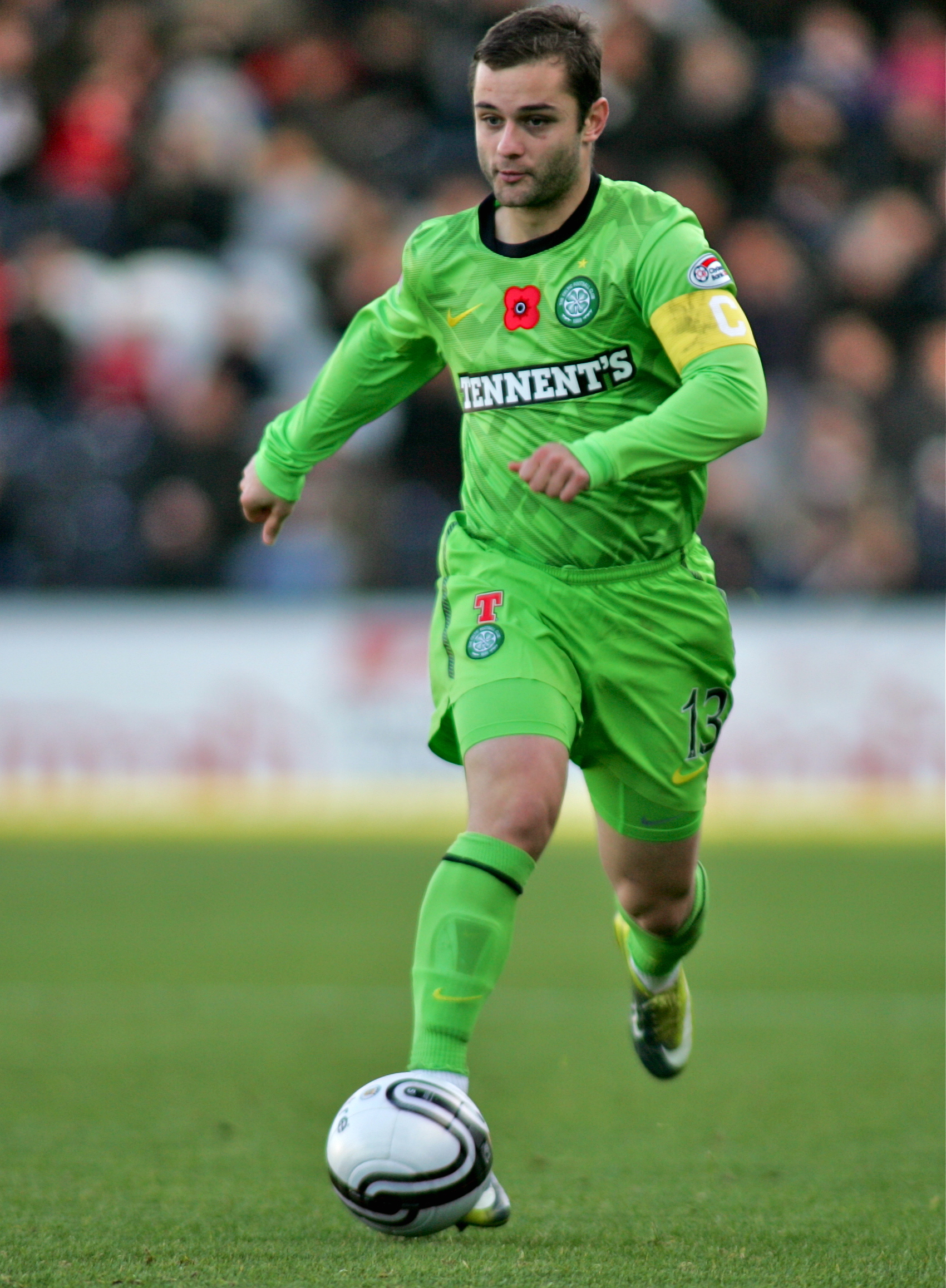 HI7Y0280